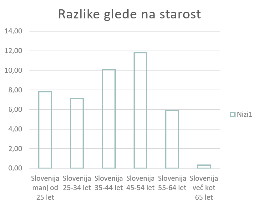 Na podlagi podatkov Evropske komisije iz leta 2013.